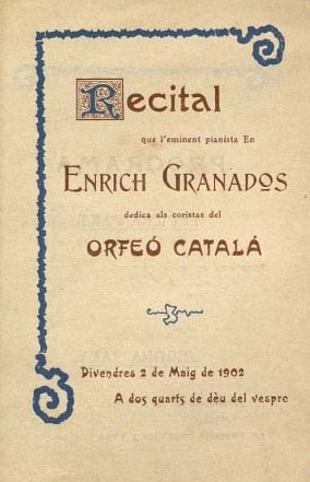 Portada del programa de mà del Recital de Granados dedicat als coristes l'Orfeó Català.